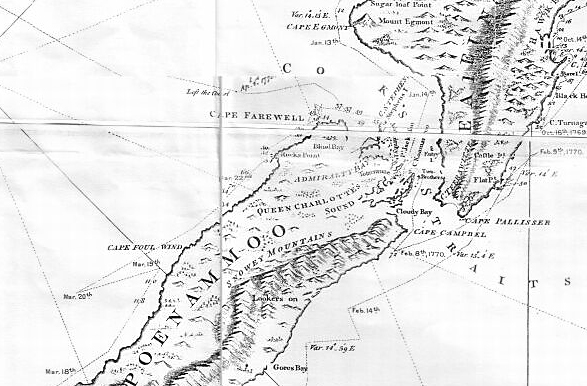 Fragmento de la ruta del HMB Endeavour en la mitad norte de la Isla Sur y del estrecho de Cook, Nueva Zelanda. Fragmento del grabado de John Bayly del mapa de Nueva Zelanda realizado por James Cook e Isaac Smith, 1769-70, publicado en la edición oficial de los diarios por John Hawkeswh en 1773.